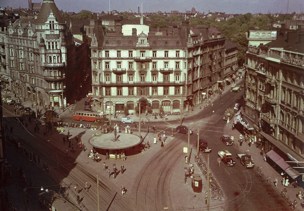 Stureplan i Stockholm i slutet på 1930-talet. I mitten Holger Bloms "Svampen" från 1937 och i bakgrunden det numera rivna Hôtel Anglais.